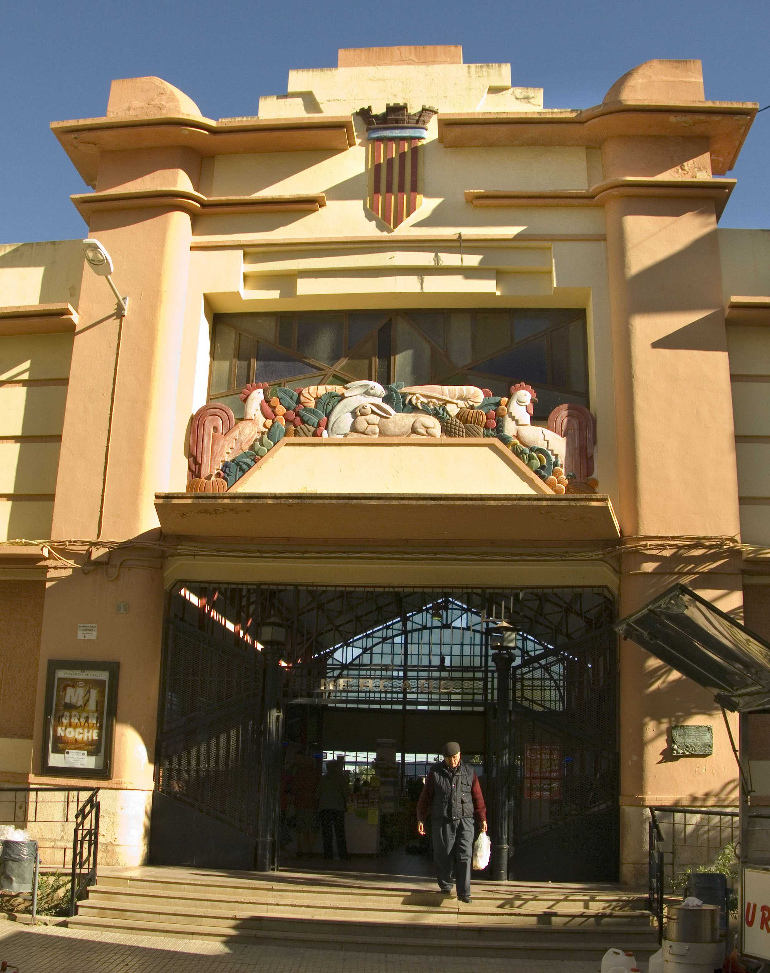 Porta d'entrada del mercat de Carlet, a la Ribera Alta.